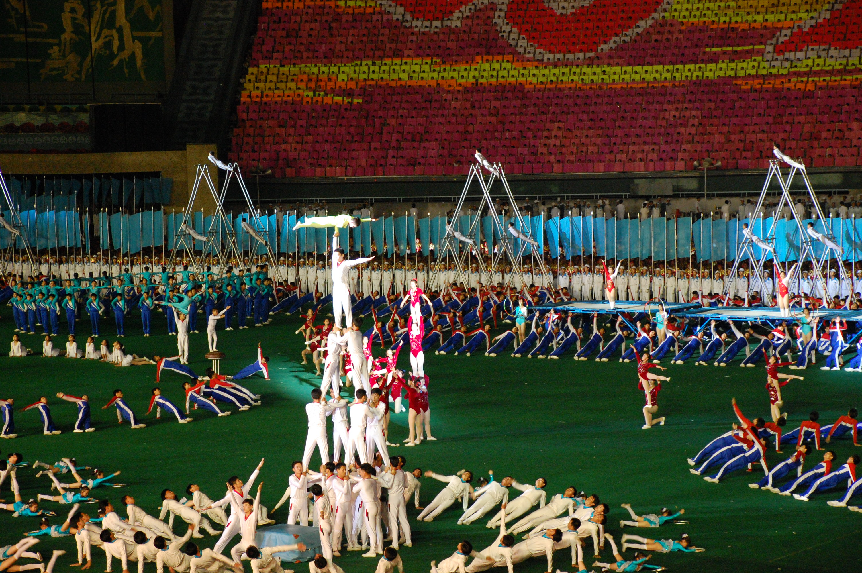 North Korea — Pyongyang, Arirang (Mass Games)